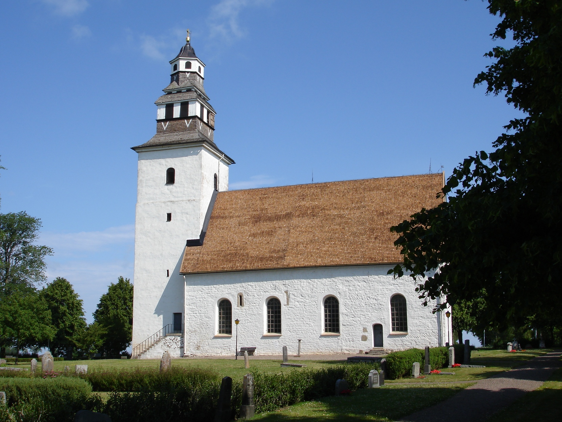 Hovs kyrka i Östergötland sommaren 2009